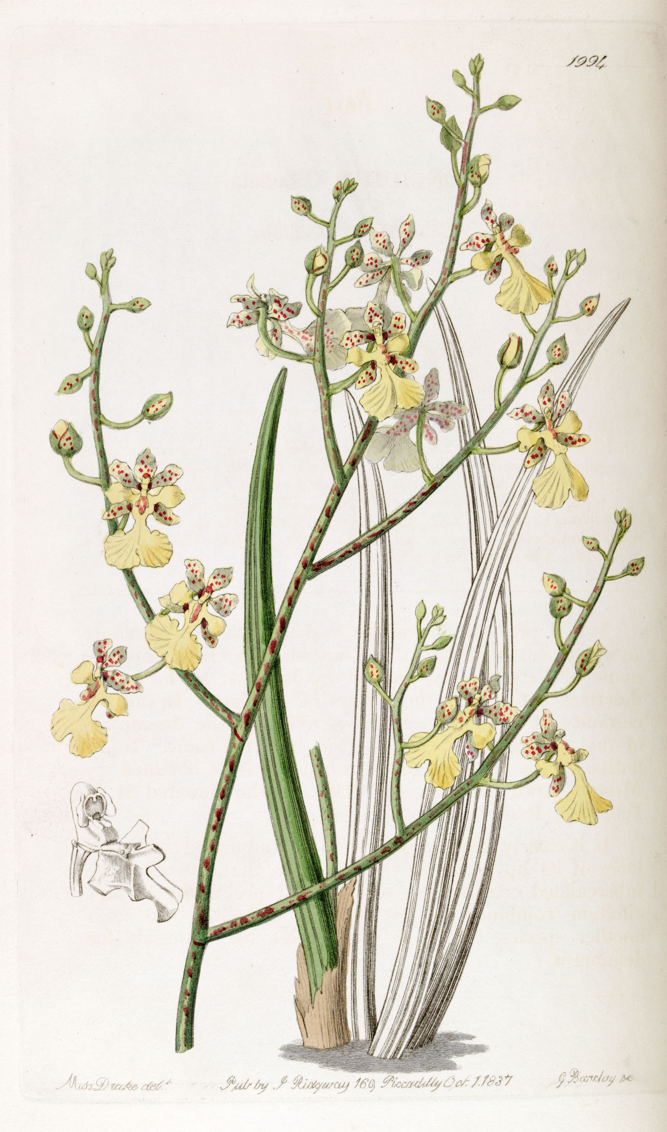 Oncidium cebolleta or Trichocentrum cebolleta